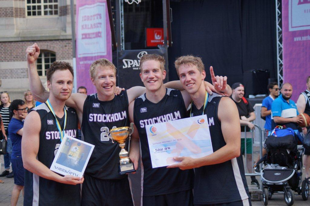 Lagbild av stockholm basketball kort efter segern i 3x3-SM i Norrköping 2016. Fv Patrik Nordström, Daniel Kulin, Viktor Henriksson, Gustav Henriksson